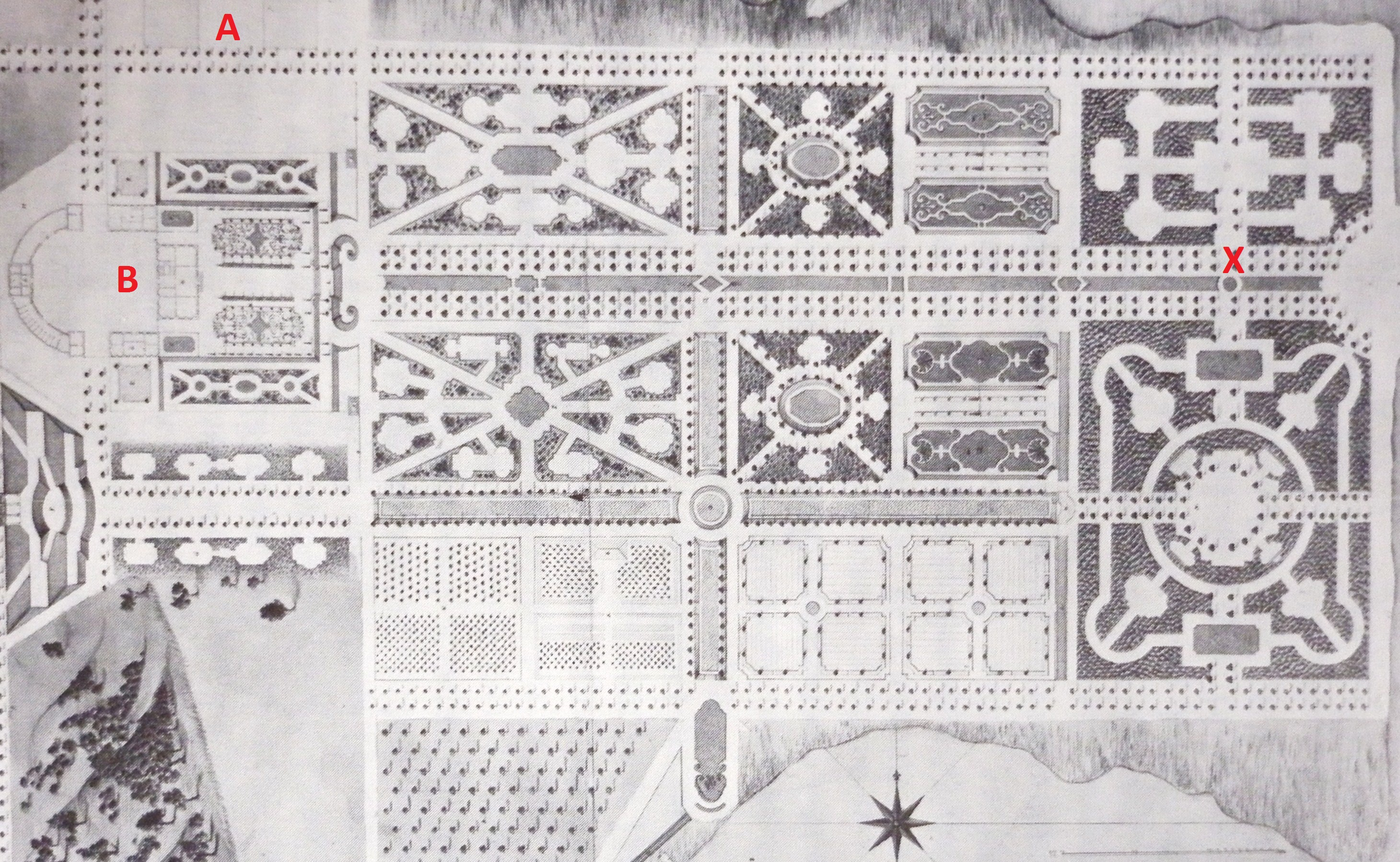 Gut Ascheberg, Stich 18. Jhd